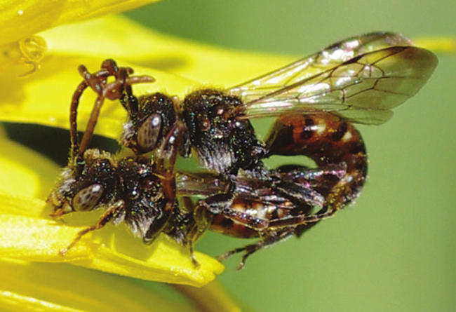 Kopulation der Kuckucksbiene (Wespenbiene) Nomada flavoguttata auf Löwenzahn. Das Männchen umgreift mit seinen Antennen die Antennen des Weibchens.